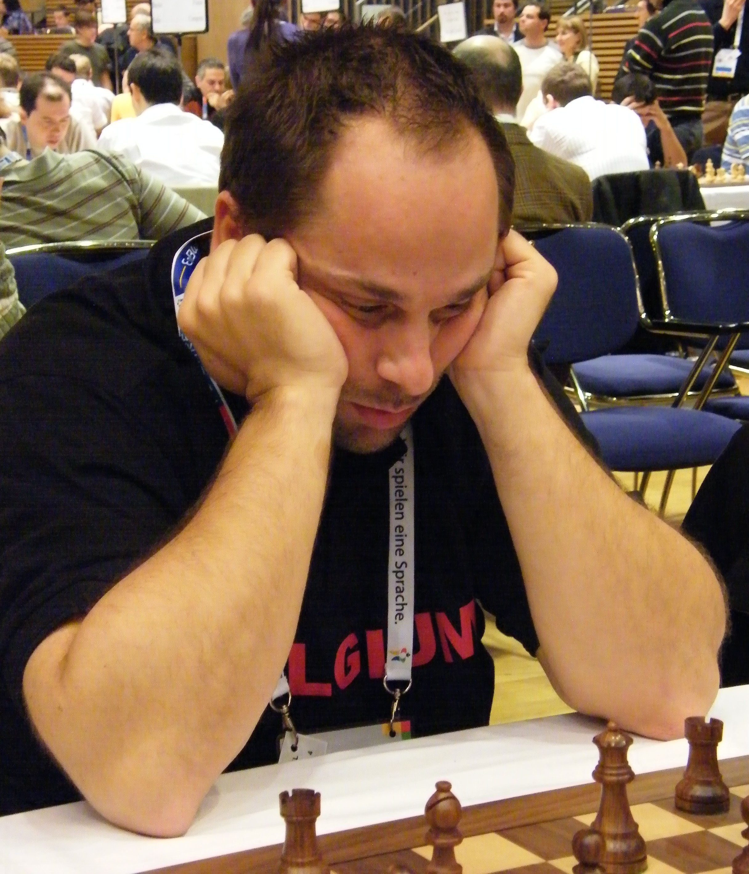 IM Bruno Laurent bei der Schacholympiade 2008 in Dresden